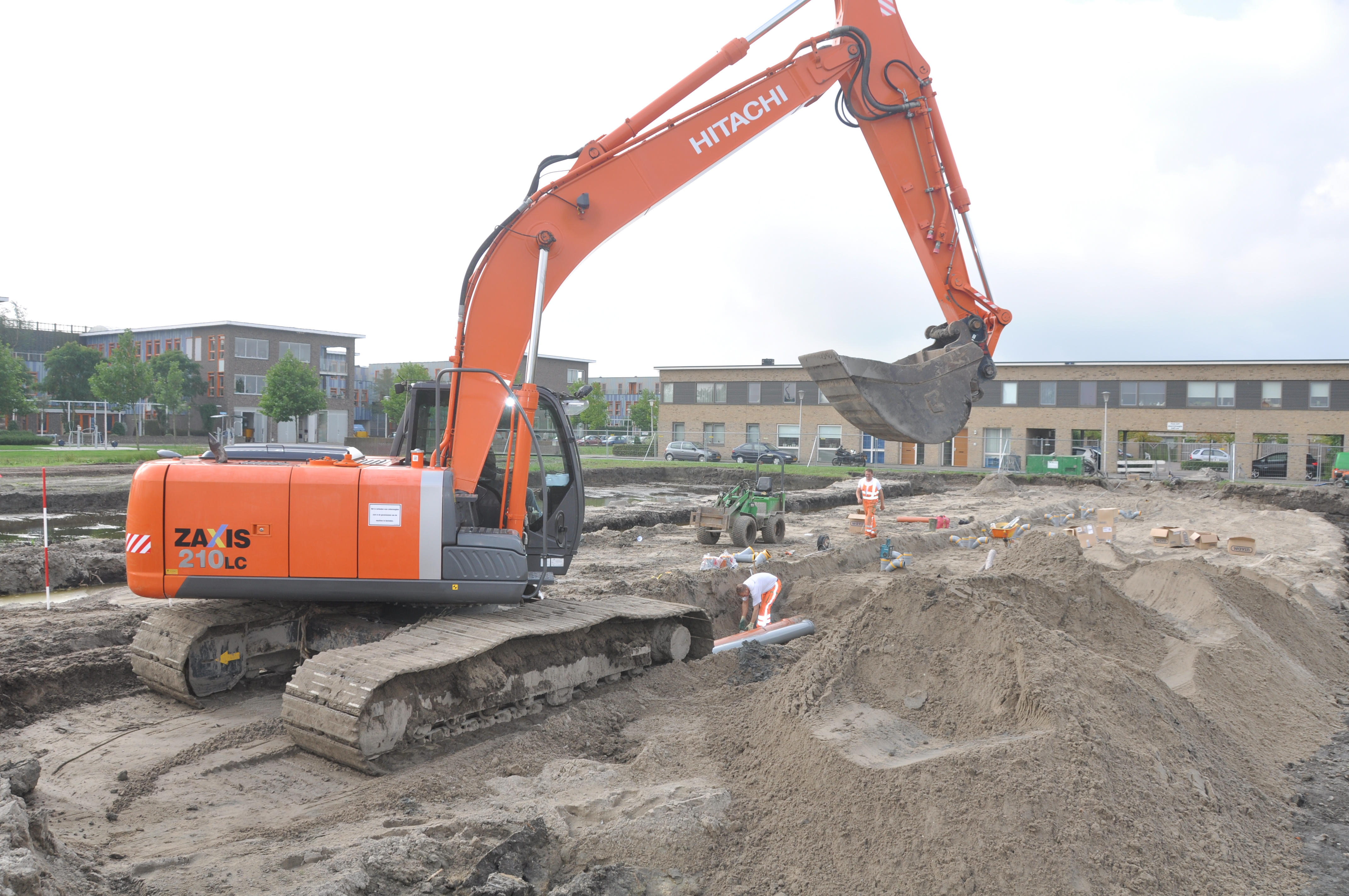 De Oosterscheldestraat in Berkel en Rodenrijs.